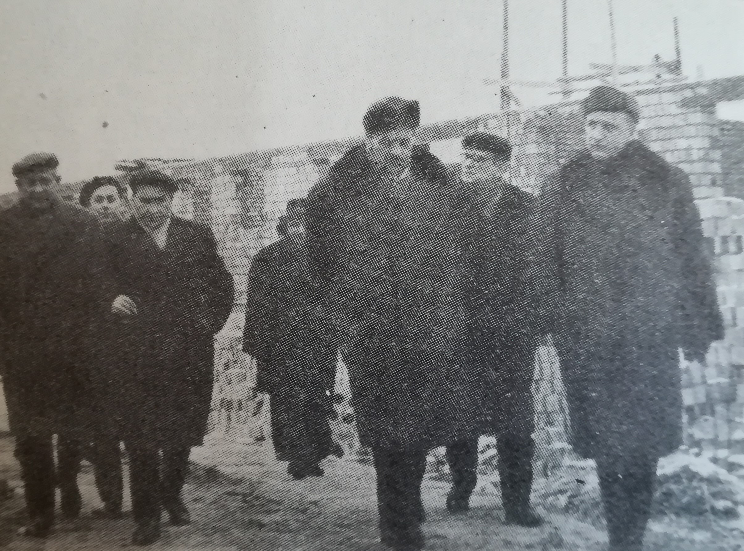 Tow. Witold Kasperski wizytuje os. Raszyn - Poznań - 1967 r.